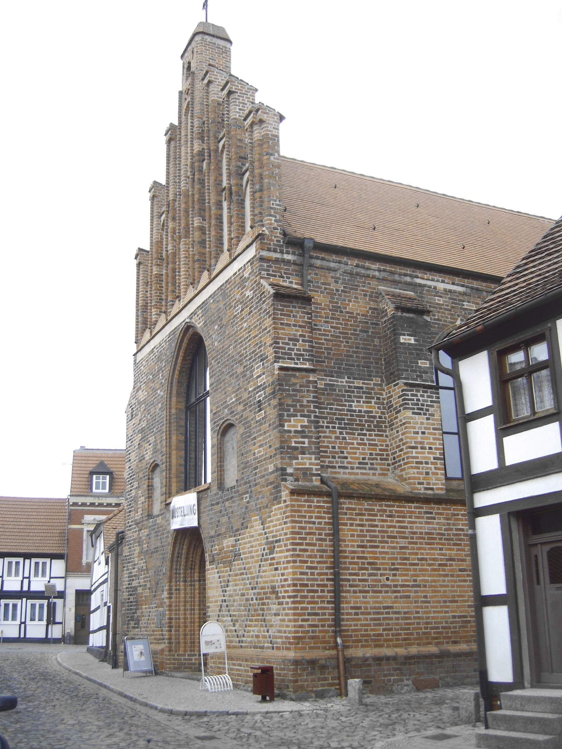 Sankt-Elisabeth-Kapelle in Tangermünde (Salzkirche)